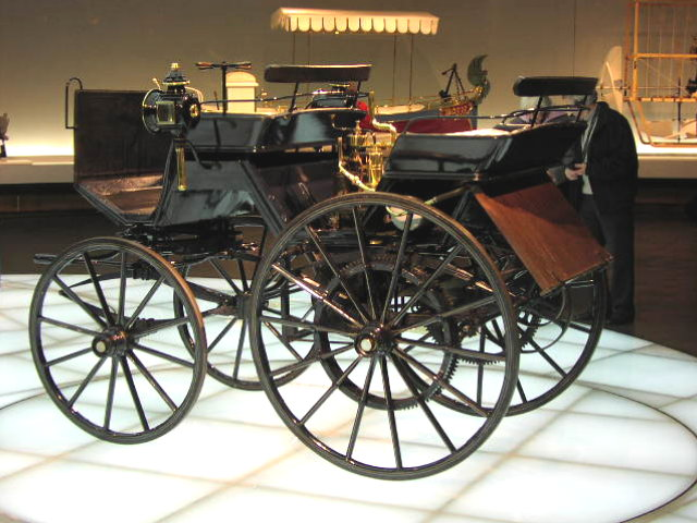 Daimler Motorkutsche 1886